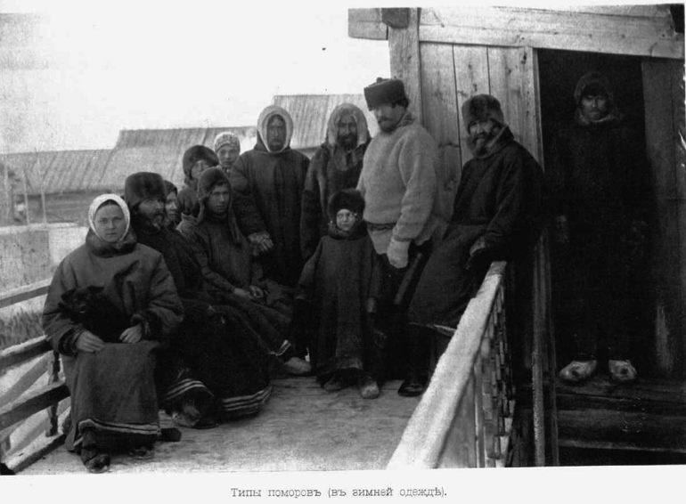 Типы поморов (в зимней одежде). Фотография из книги «Северный край. Иллюстрированный альбом Архангельской губернии». С.-Петербург, 1914 г.